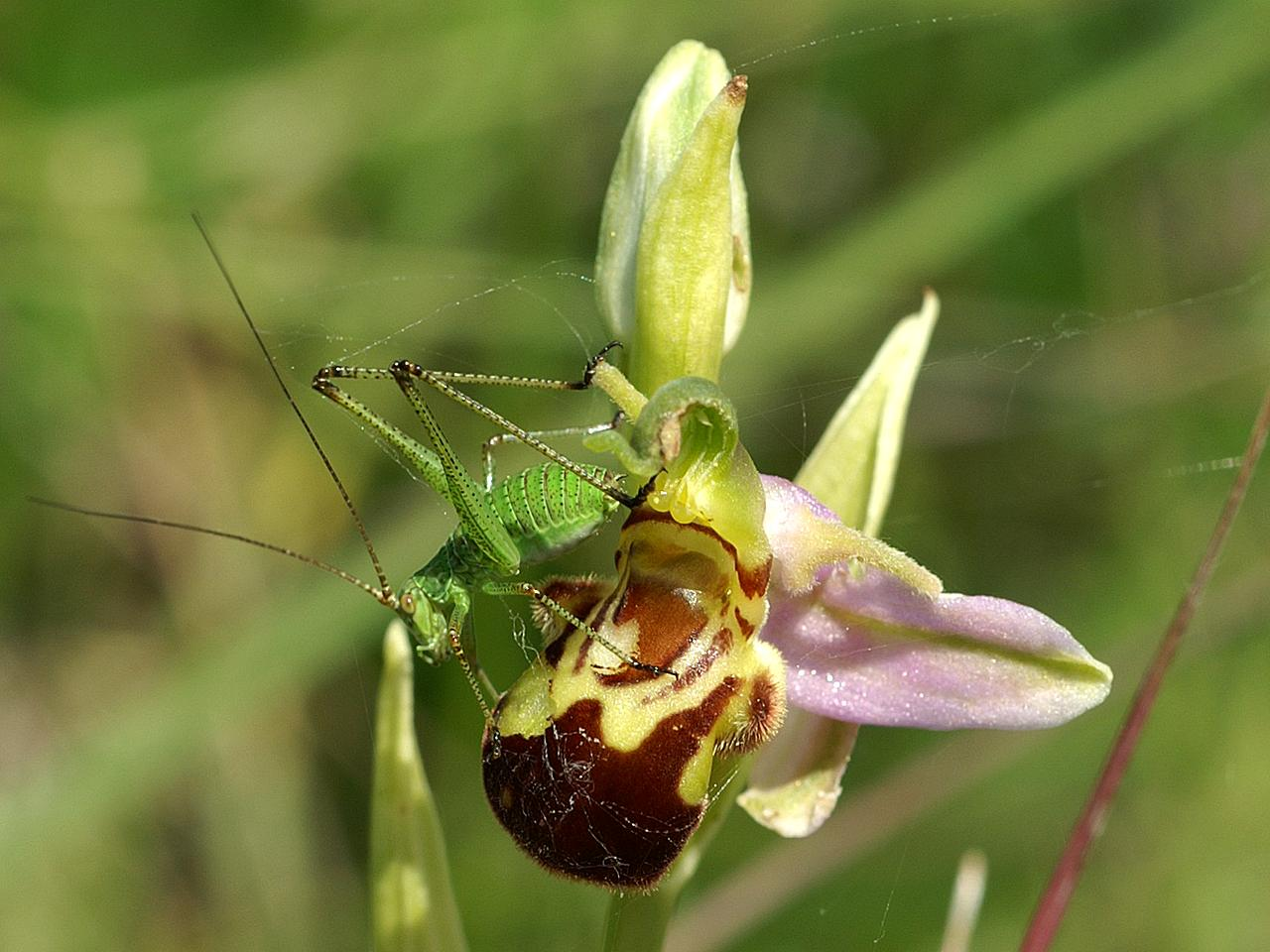 Ophrys apifera